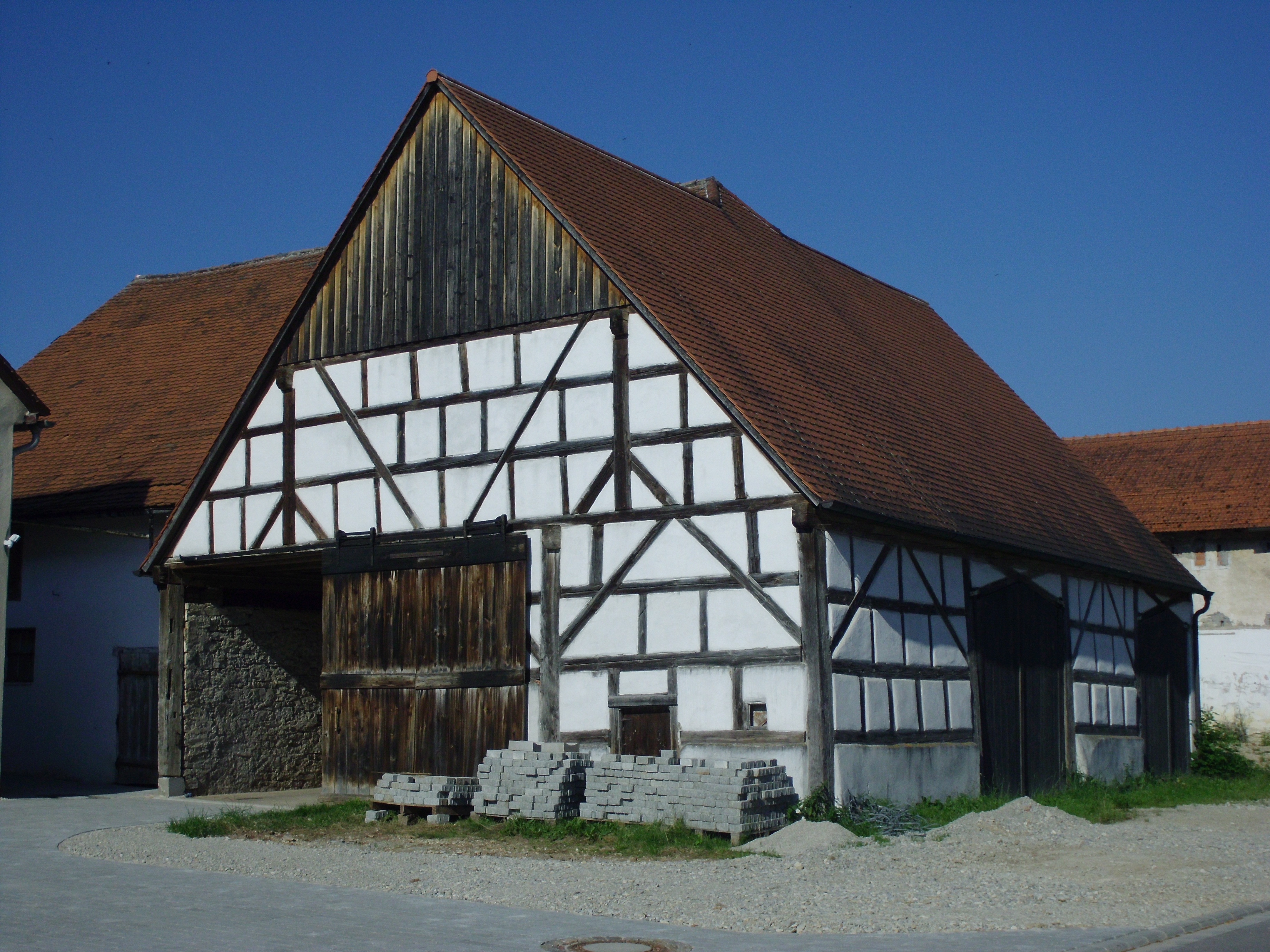 Kleinhöbing, Ortssteil von Thalmässing im mittelfränkischen Landkreis Roth, Fachwerkstadel